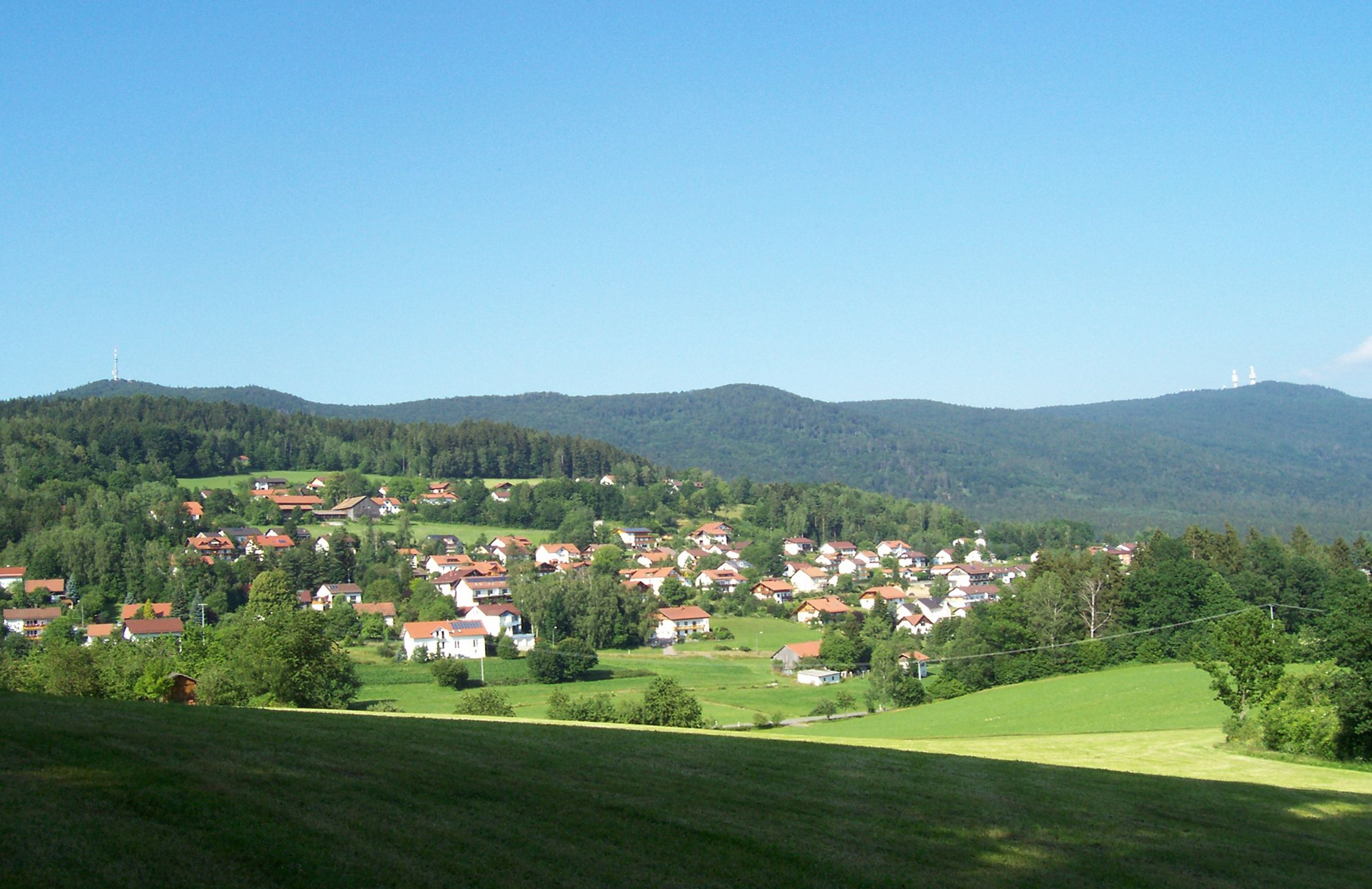 Der Hohe Bogen von seiner Südseite